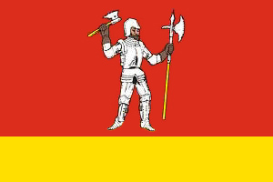 vlajka Lomnice nad Popelkou